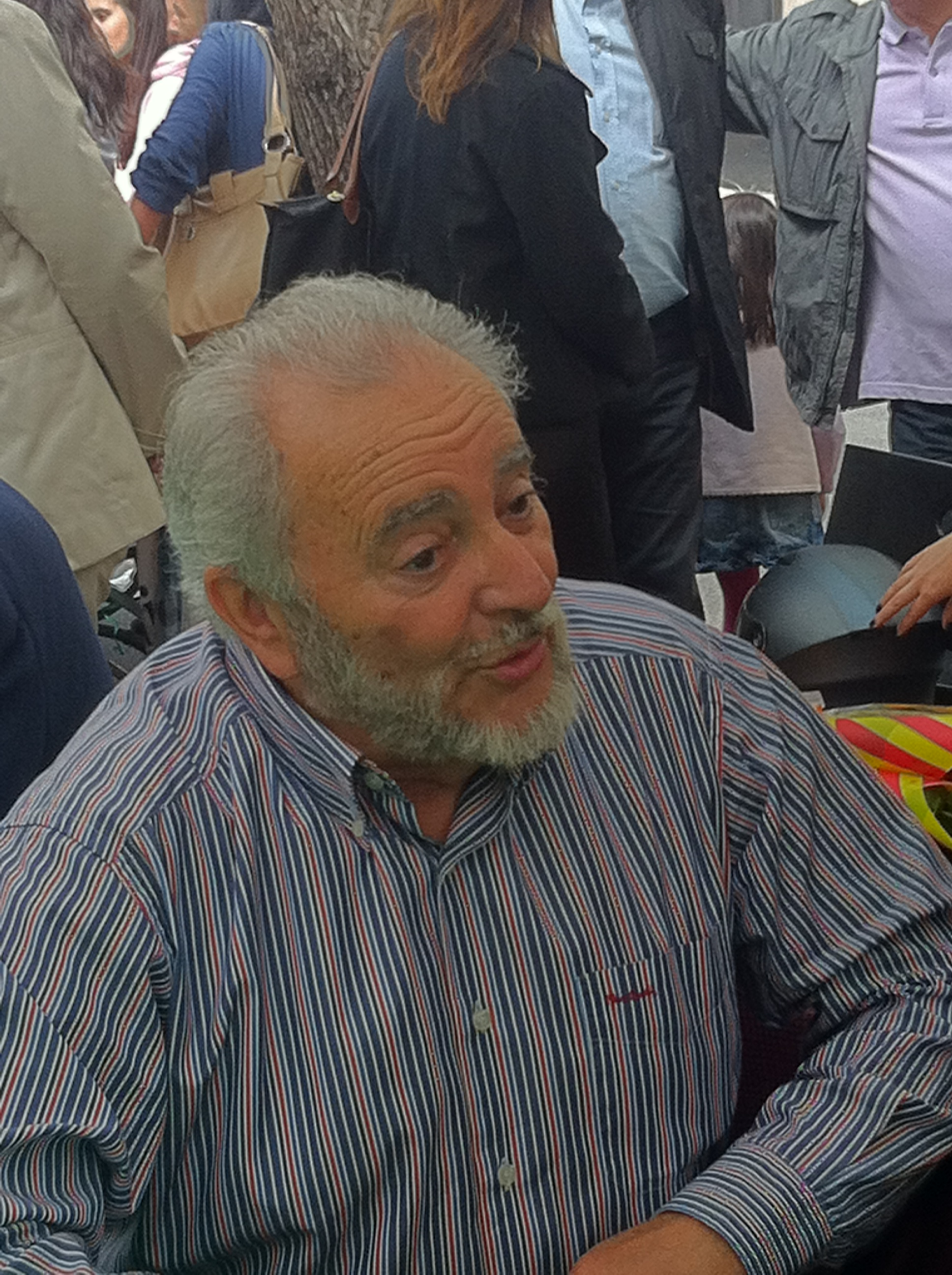 Diada de Sant Jordi 2014